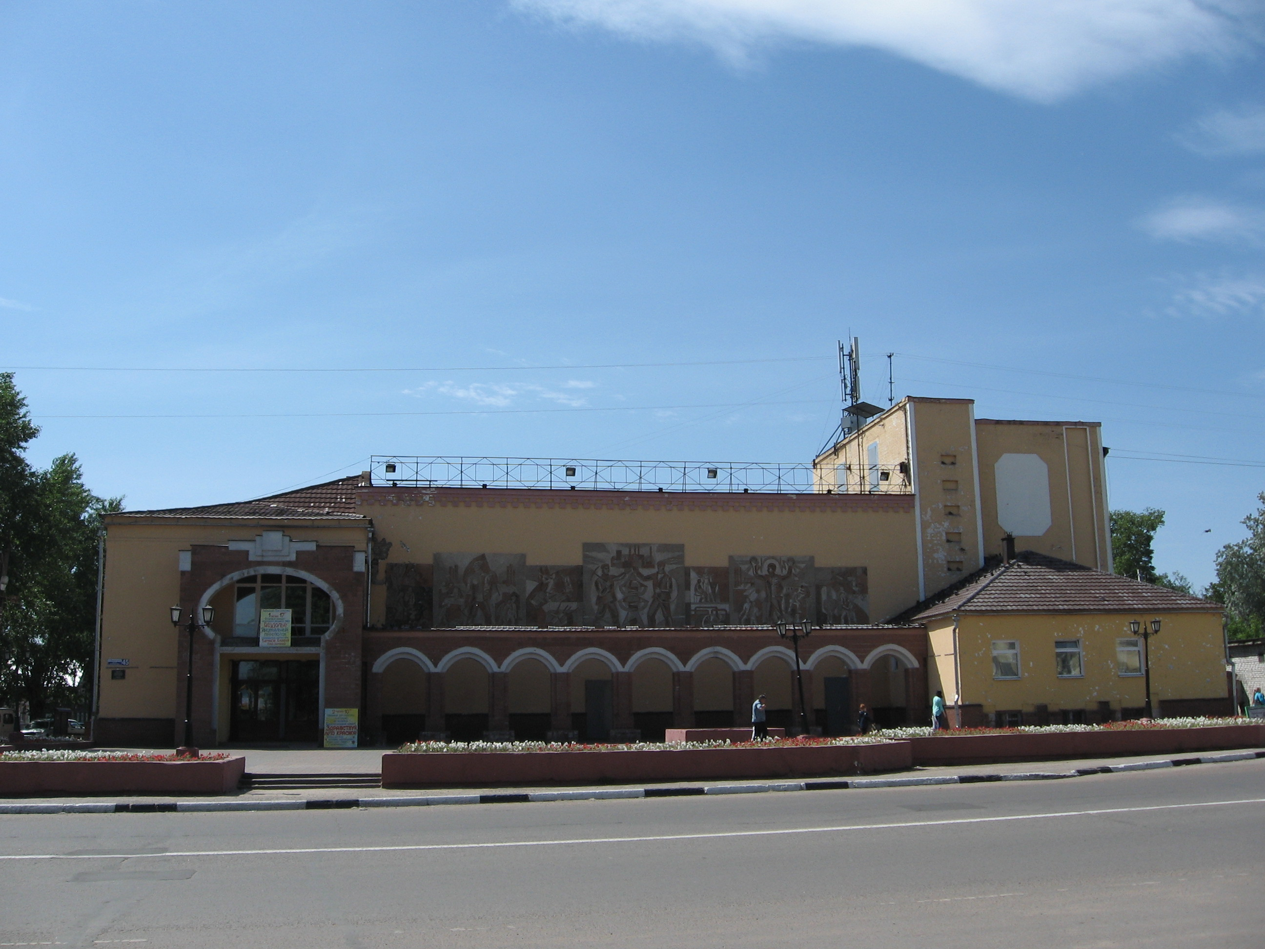 ДК ГоГРЭС в Балахне